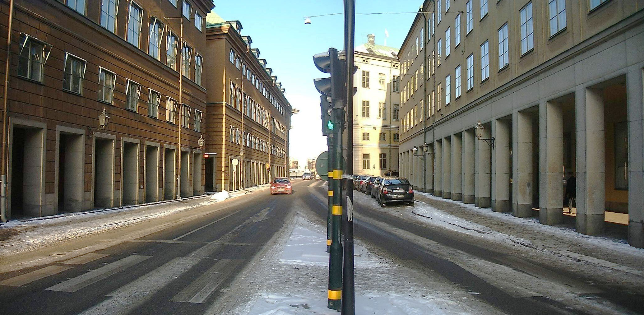 Myntgatan in Gamla stan.